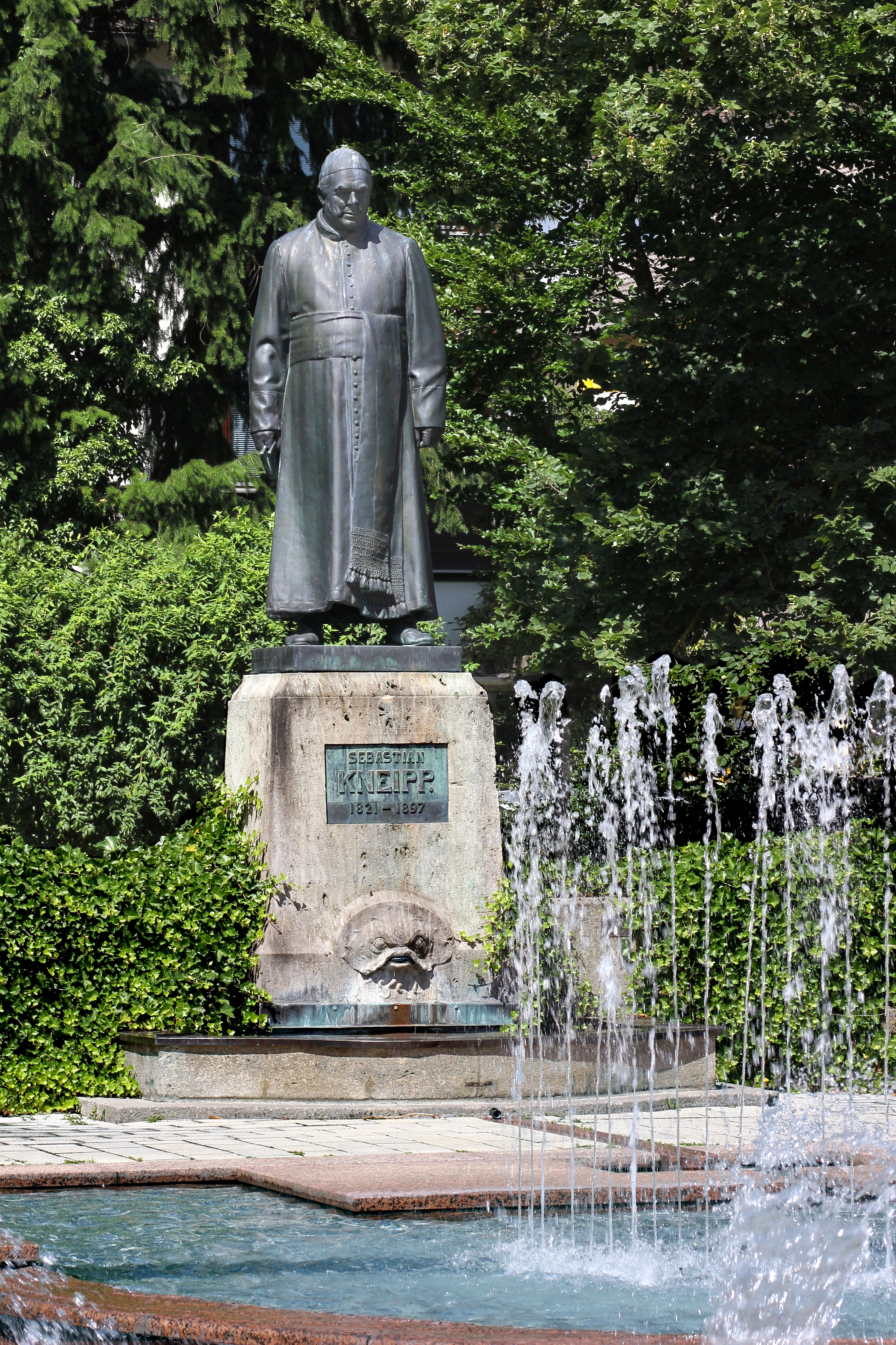 Kneippdenkmal von Georg Albertshofer 1903 in Bad Wörishofen, Denkmalplatz